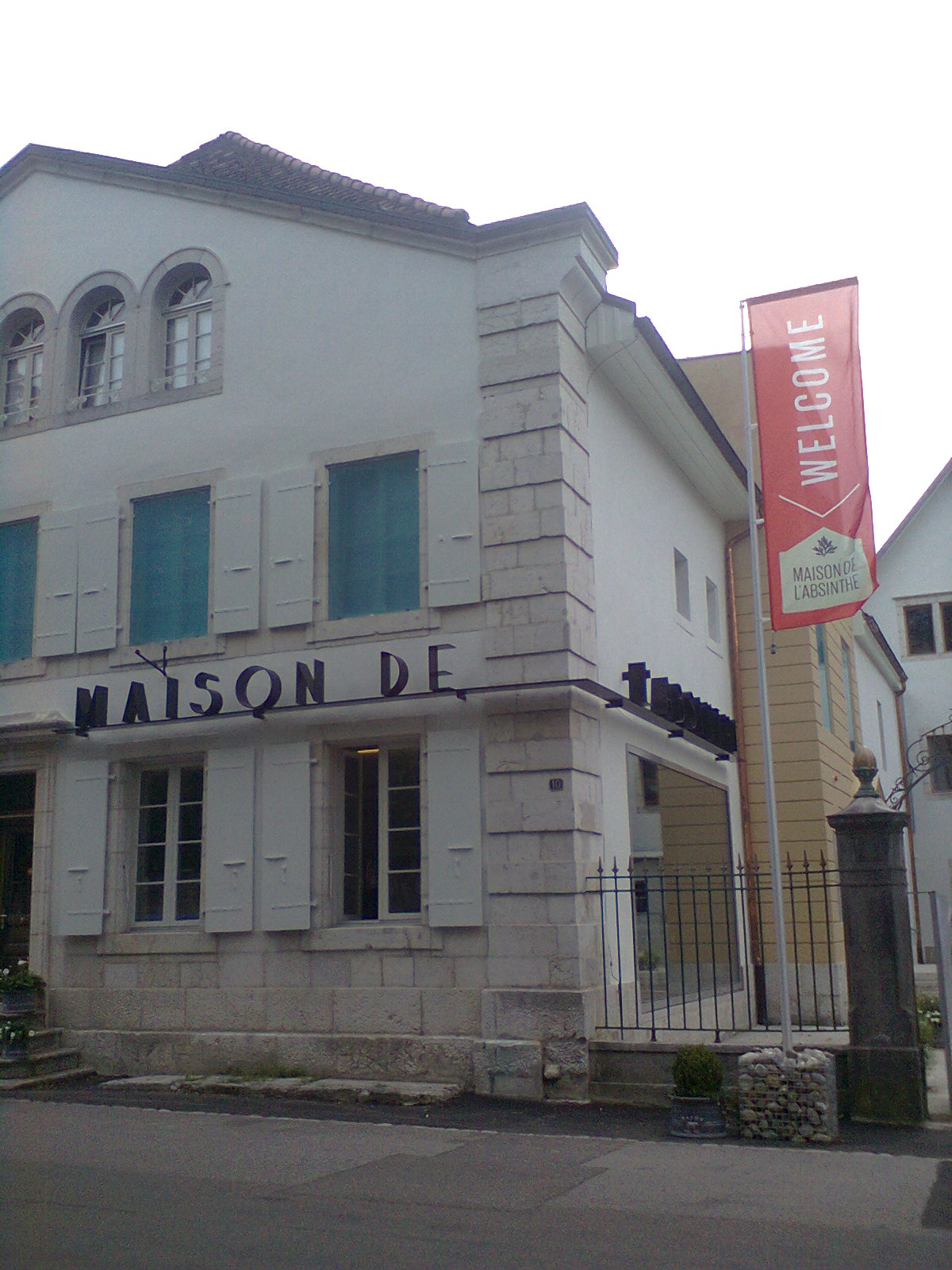 Maison de l absinthe môtiers